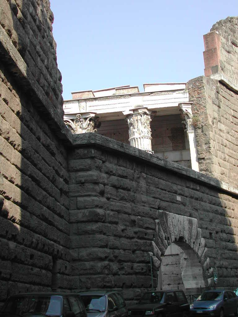 Roma, muro della Suburra e Arco dei Pantani; dietro, il tempio di Marte Ultore